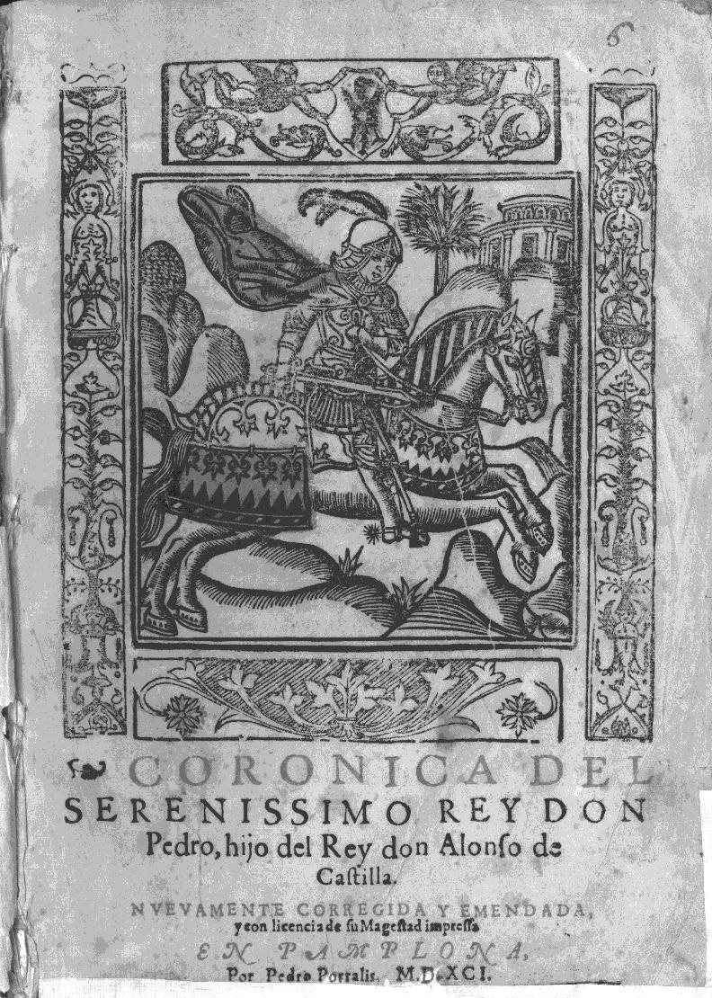 Crónica del Rey don Pedro de Castilla. Pamplona, Pedro Porralis de Saboya, 1591